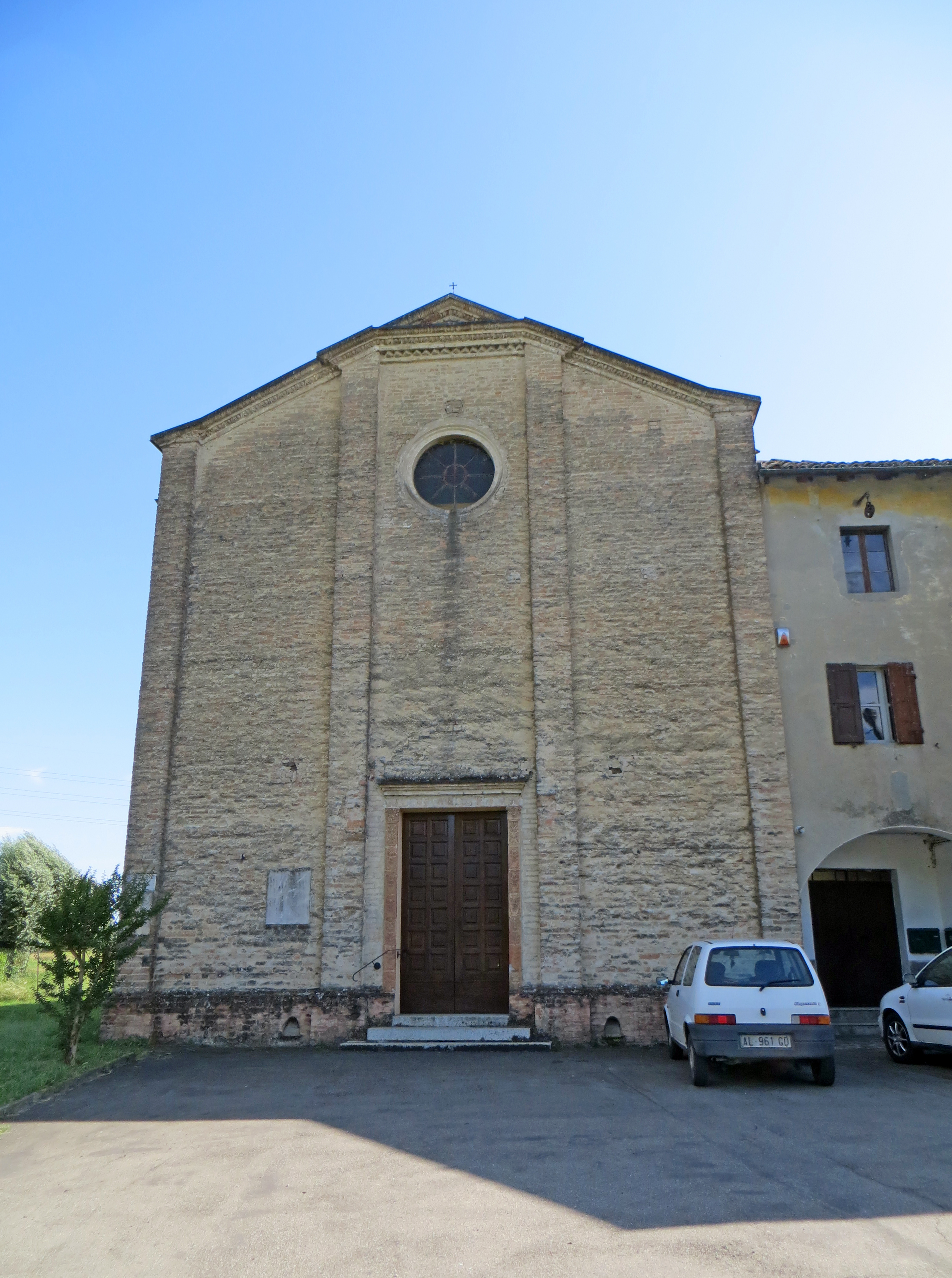 Chiesa di San Giovanni Battista (Pedrignano, Parma) - facciata